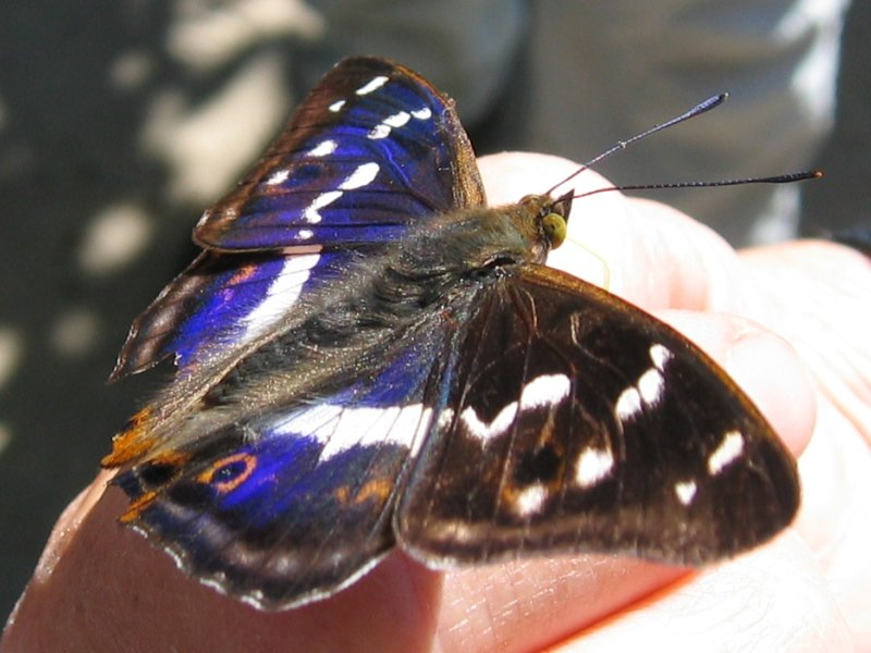 Großer Schillerfalter Apatura iris, Müritz-Gebiet